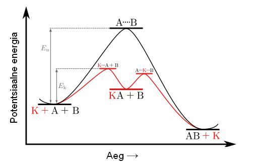 Katalüütilise ja mittekatalüütilise reaktsiooni energiaprofiil.